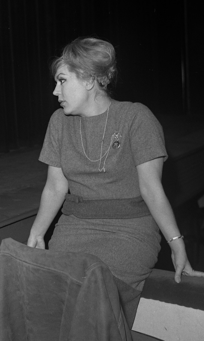 Théâtre du Capitole. Le 17 Octobre 1962, Vue de Jeanne Rhode, Albert Lance et Roberto Benzi dans la loge, avant la représentation de Carmen de Georges Bizet, mis en scène par Raymond Rouleau.